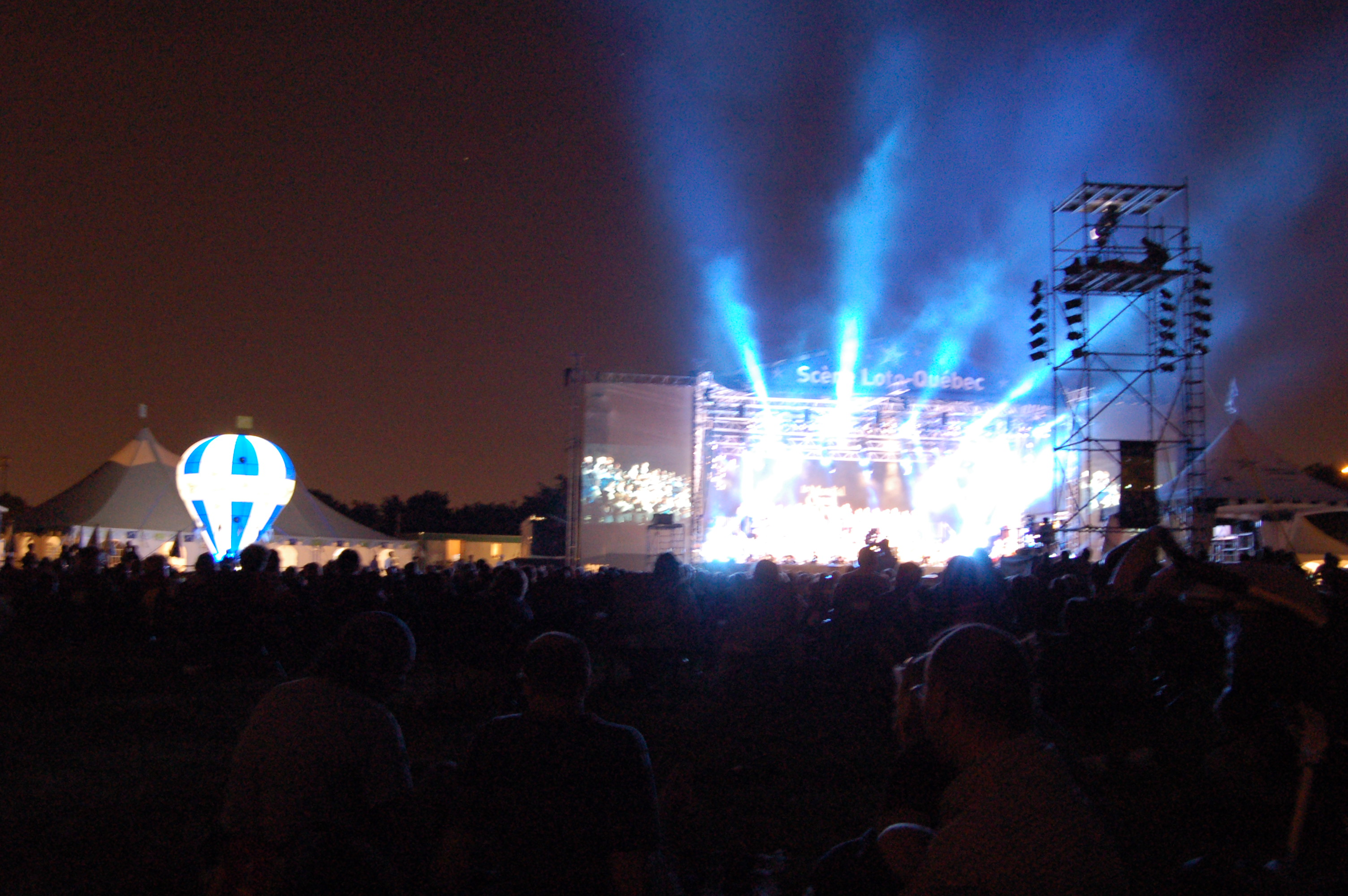 Spectacle d'envergure du Mondial Choral Loto Québec de Montréal 2006